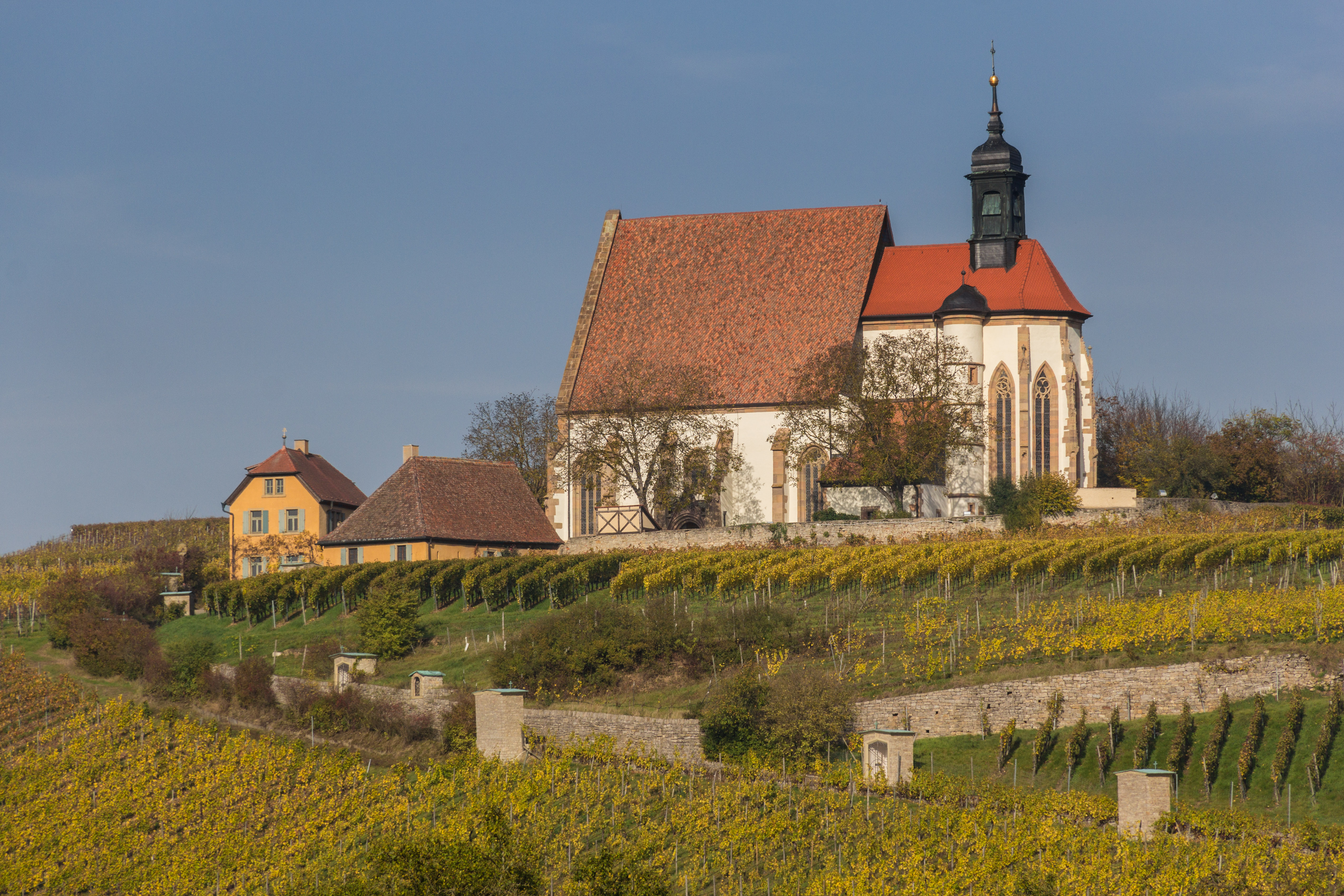 Wallfahrtskirche St. Maria im Weingarten, VolkachThis is a photograph of an architectural monument.